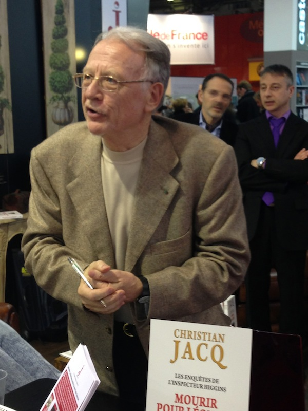 Christian Jacq, pour son livre Mourir pour Léonard, enquête de l'inspecteur Higgins. Salon du livre de Paris, 2013.